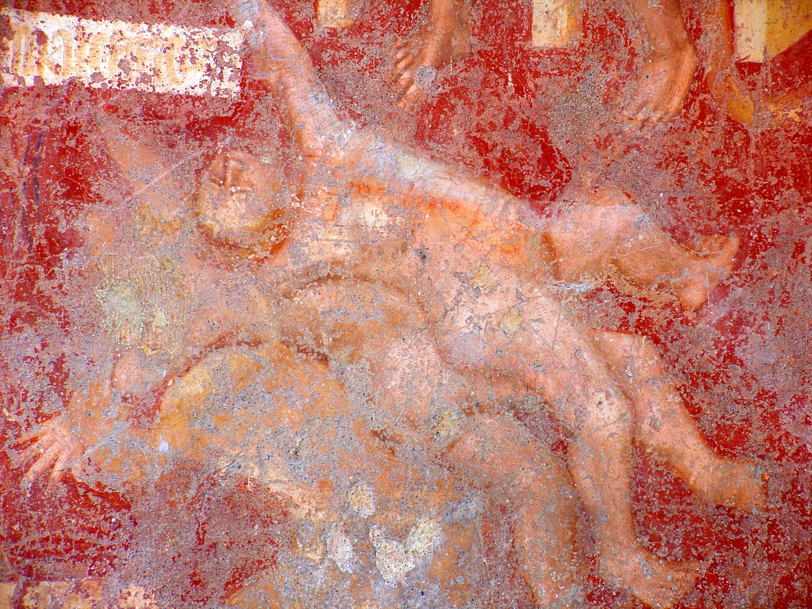 Santa maria dei ghirli, giudizio universale, famiglia de veris, 1400 03